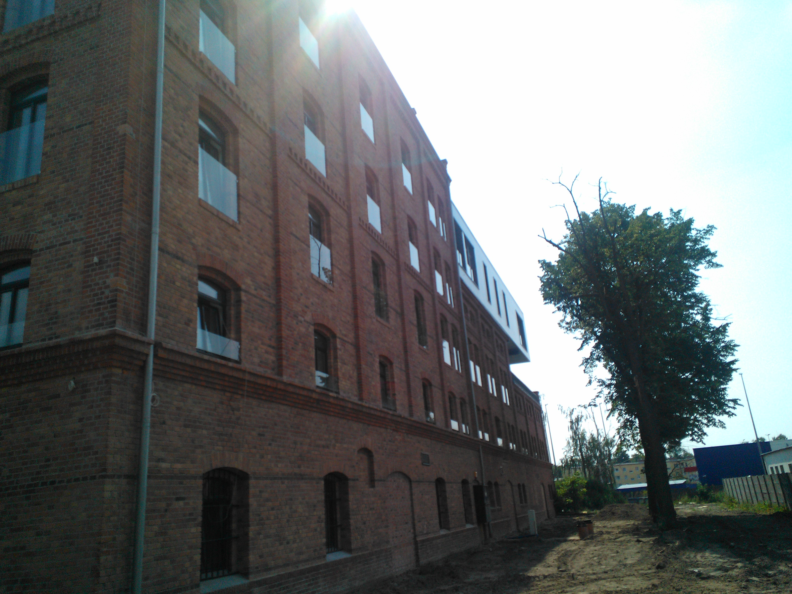 Szamotuły - pierwotnie Młyn Żytni, obecnie (od 2014) budynek mieszkalno-usługowy.